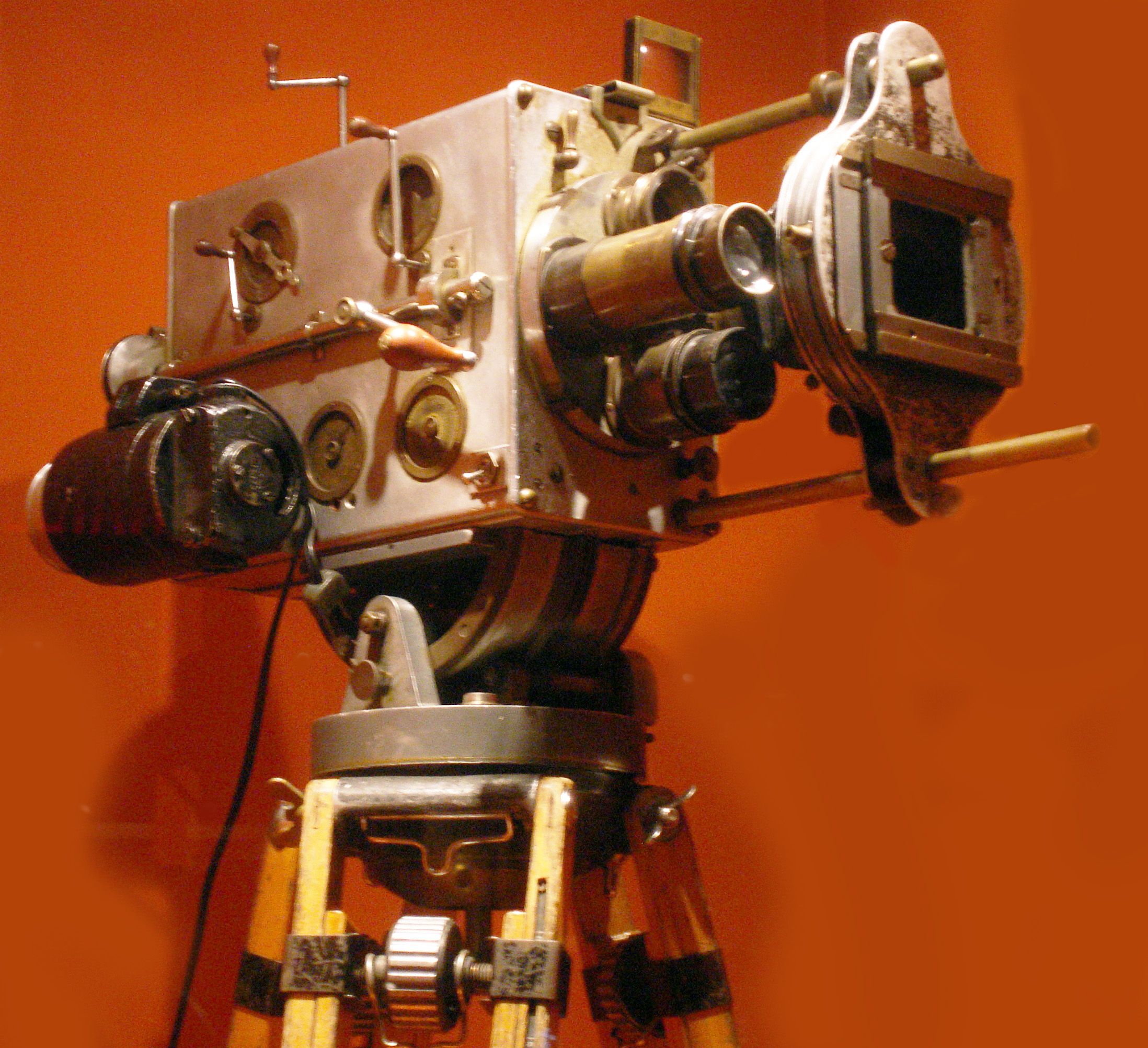 Caméra argentique 35 mm "Caméréclair", de la société française Éclair (1928).